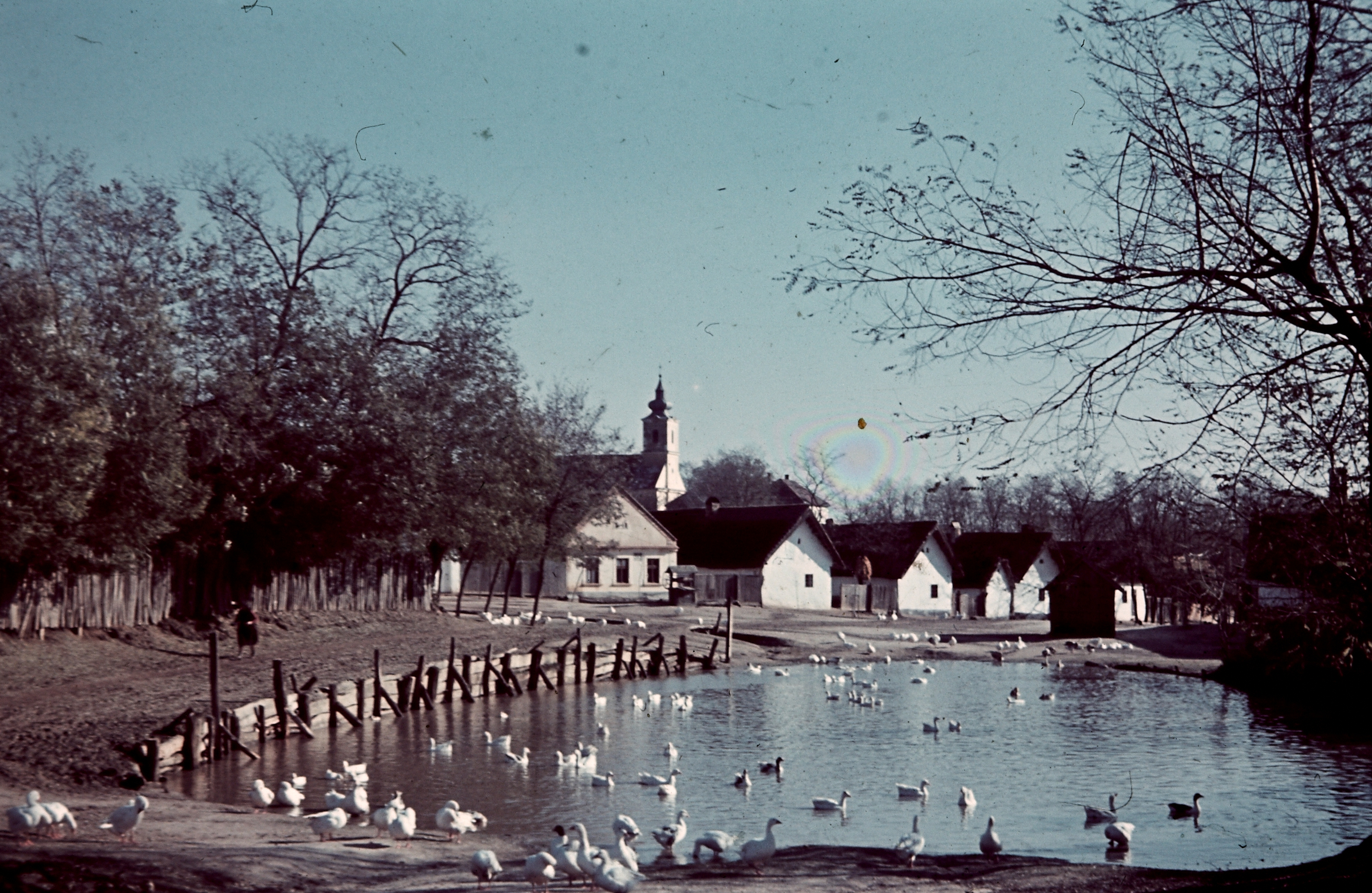 kacsaúsztató. Location: Hungary, Gyarmat Tags: village, lake, colorful Title: kacsaúsztató.